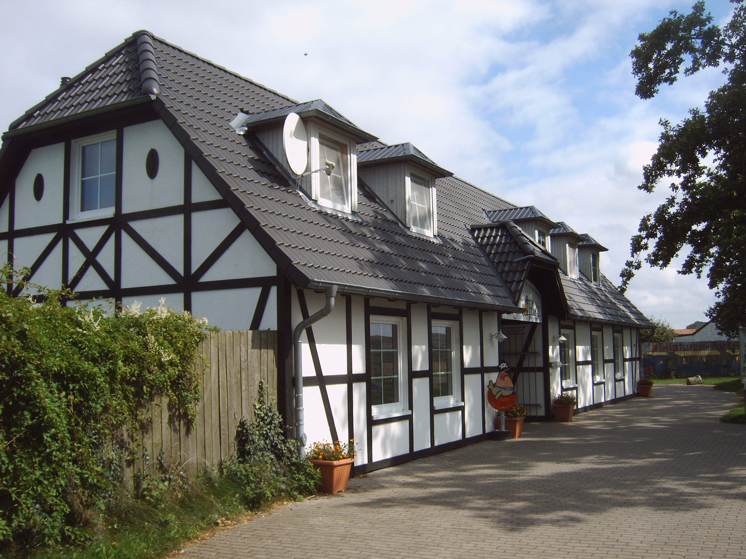 Rügen Park,Eingang, Freizeitpark auf Rügen, Gingst, Deutschland